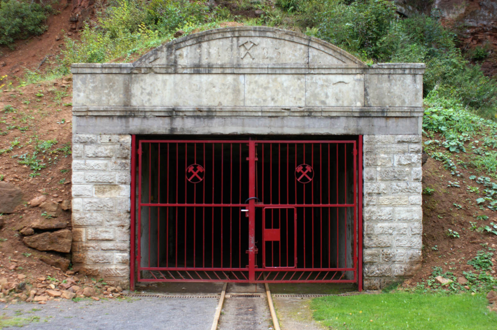 Agank Mine Walert/Kierchbierg zu Rëmeleng. September 2010